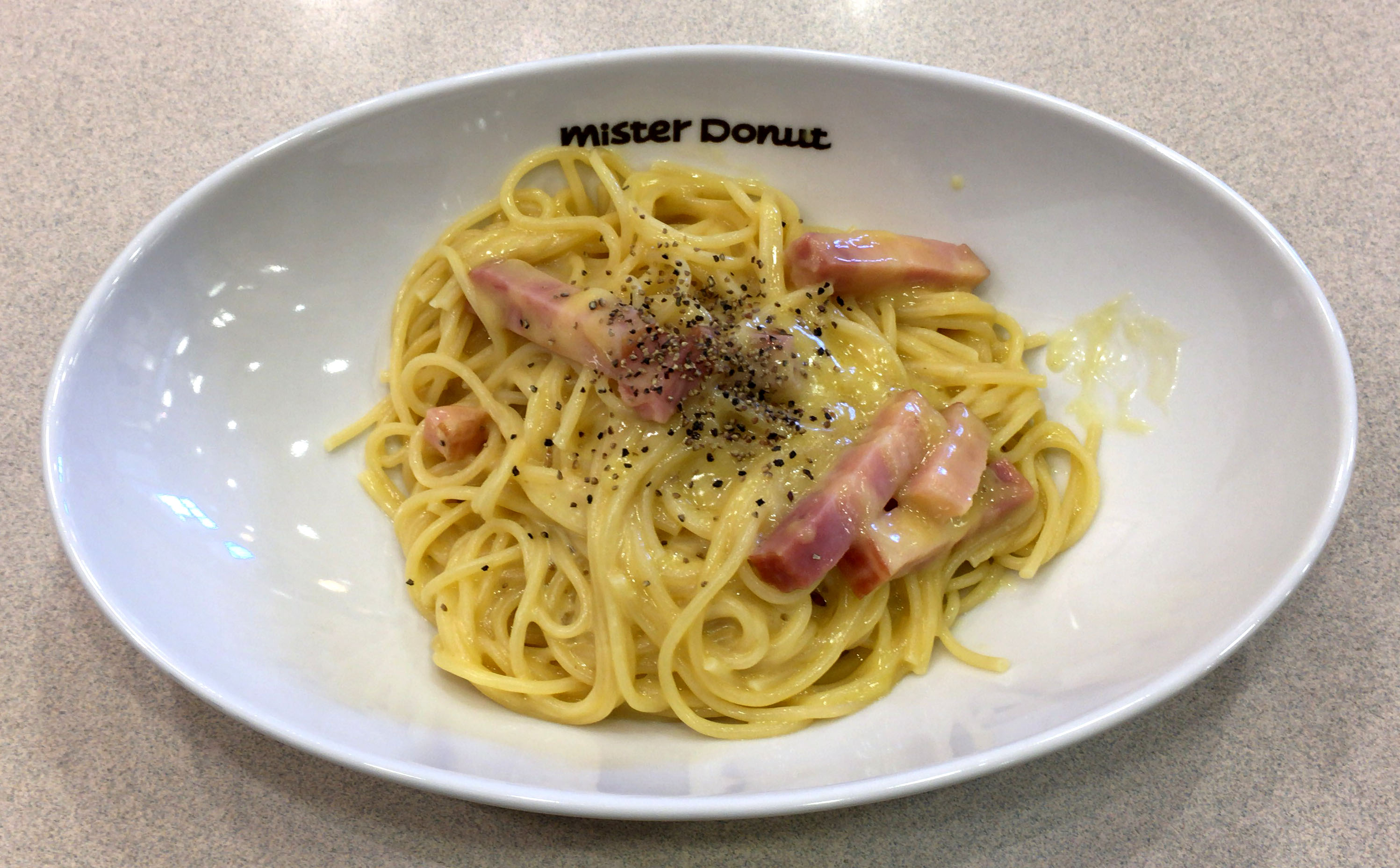 ミスタードーナツ 5種チーズのカルボナーラ（693円）